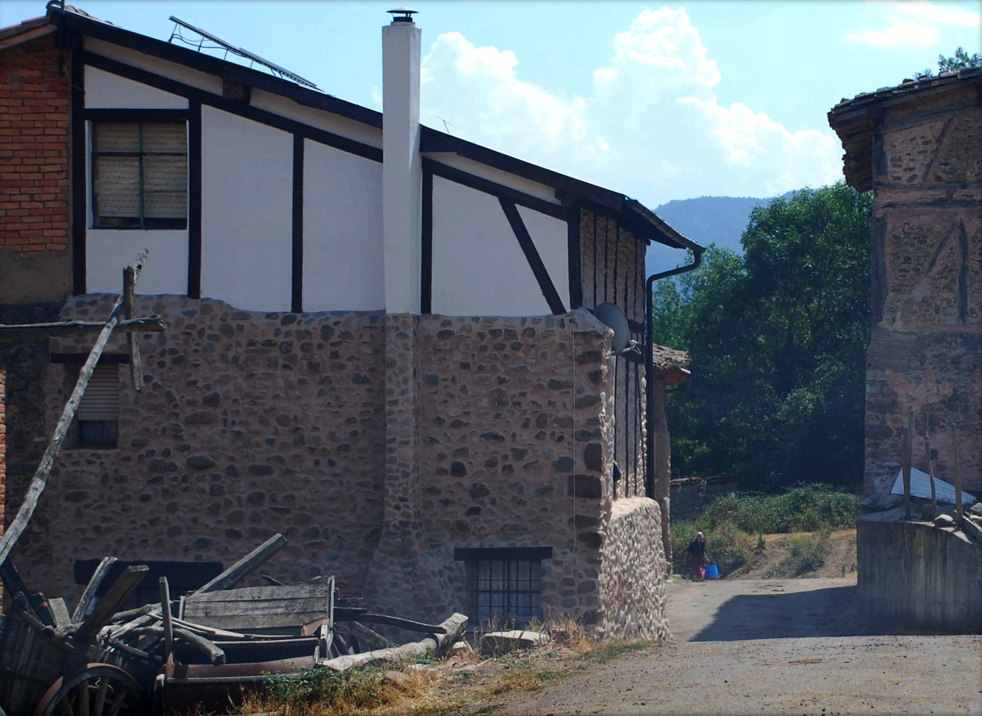 Arviza, aldea de Ojacastro en La Rioja (España).